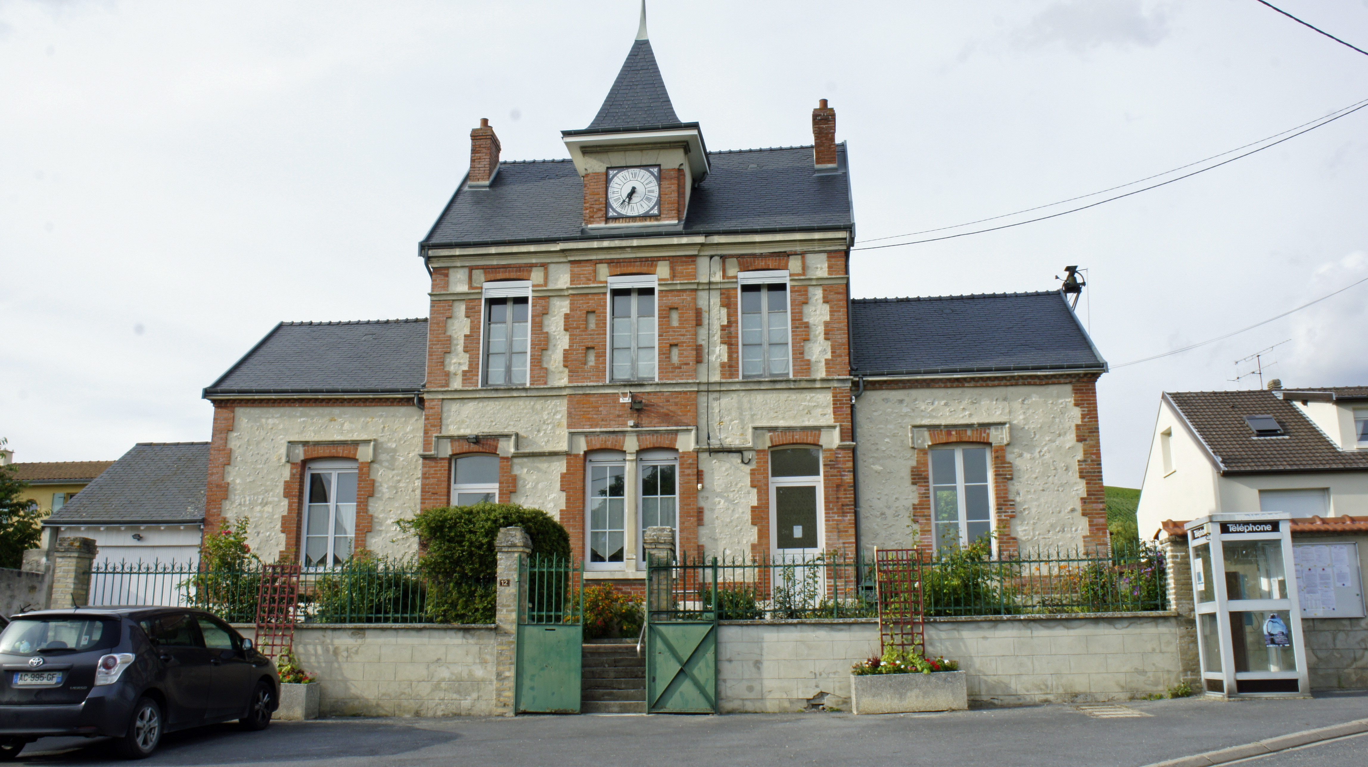 st-Eupraise-et-Clariset, vue de la mairie.